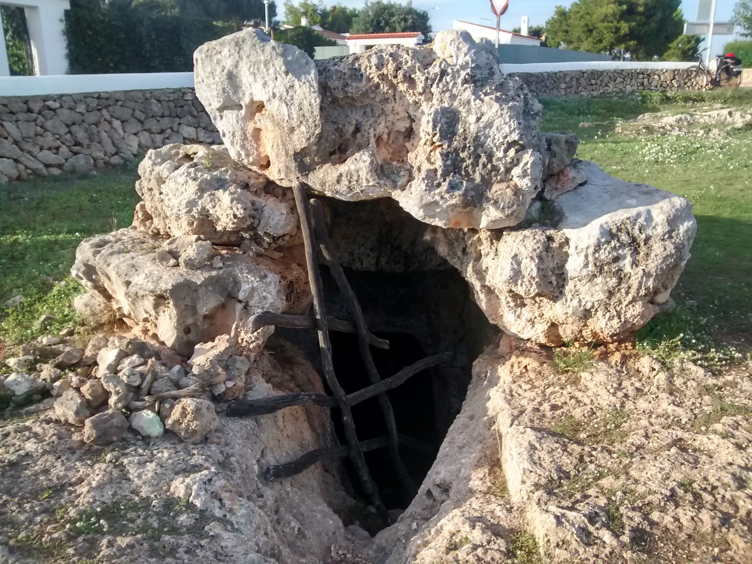 Hipogeu de la Torre del Ram (Es Bancals)